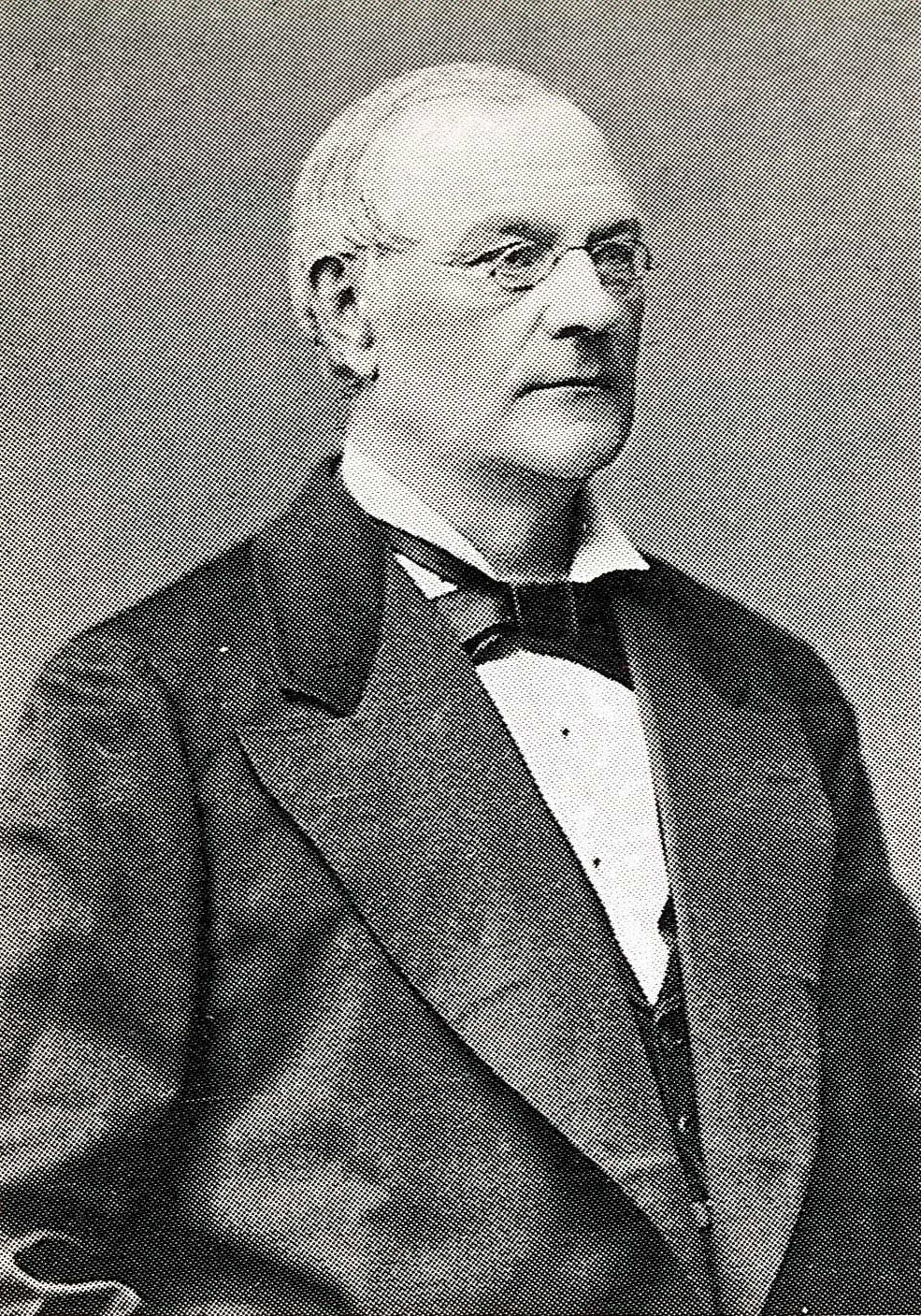 Professori, arkkiatri Otto E. A. Hjelt (1823–1913), kuvattu Tukholmassa 1870-luvun alussa ([1]).